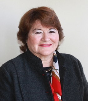 Adriana Peñafiel, directora regional del Servicio Nacional de Turismo para Coquimbo.